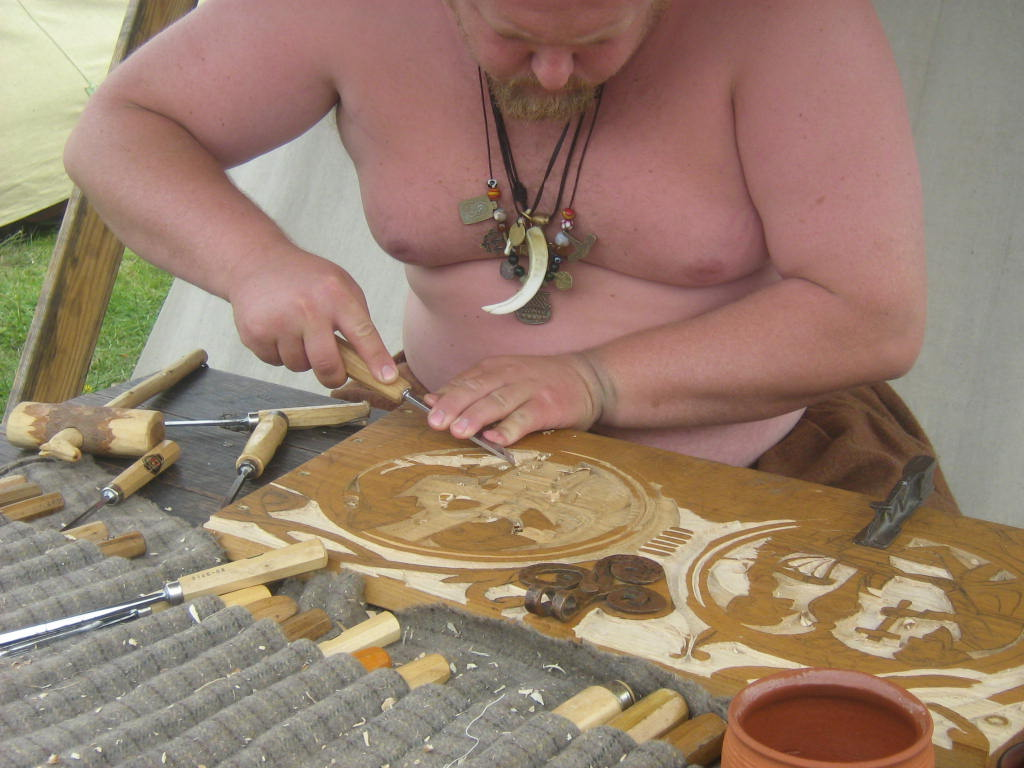 Snycerz podczas pracy na Festiwalu Słowian i Wikingów w Wolinie.